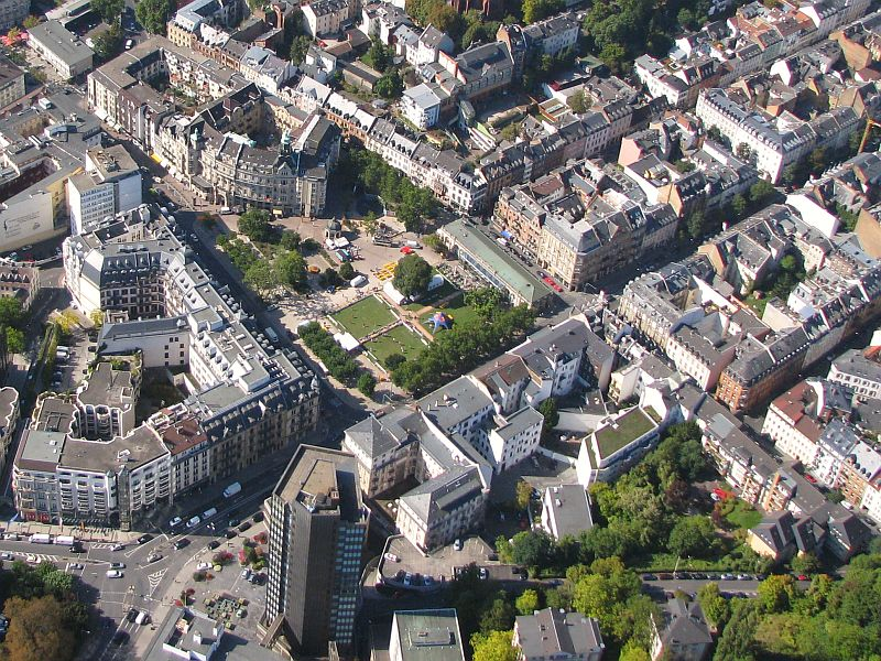 Luftbild Wiesbaden Kranzplatz Georg-August-Zinn-Straße Kochbrunnen-Platz Taunusstraße Kureck Foto 2008 Wolfgang Pehlemann Wiesbaden IMG_0193.jpg